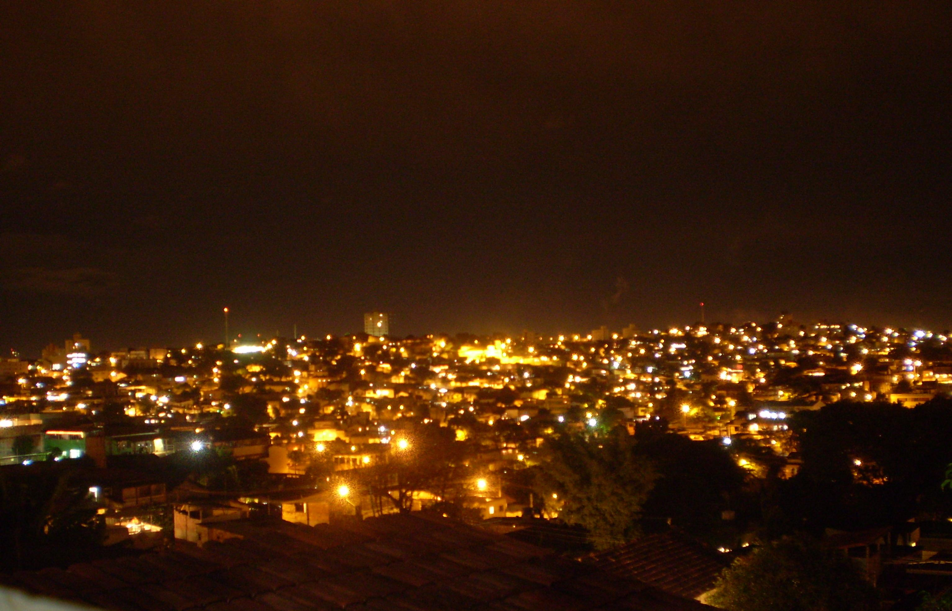 Vista noturna do bairro Boa Vista a partir do bairro São Geraldo, Belo Horizonte, Minas Gerais, Brasil.